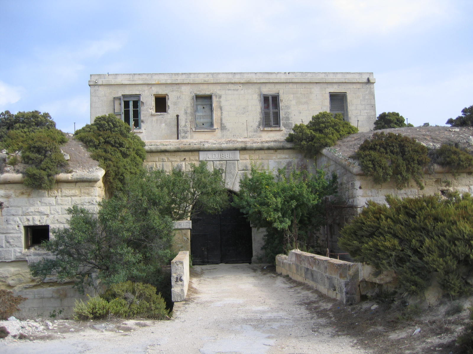 Gatehouse, Fort Delimara, Delimara Point, Malta.